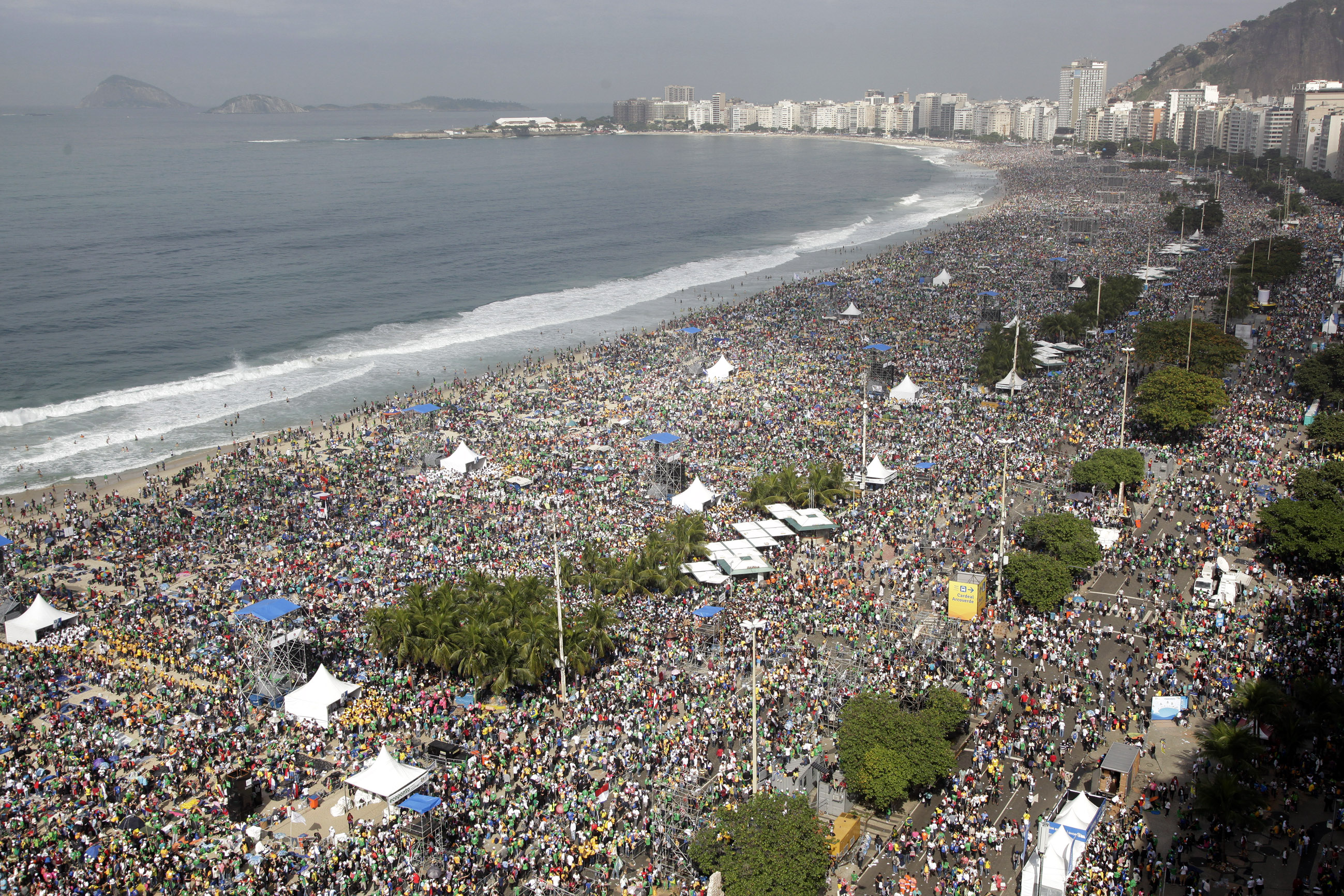 Foto: Felipe Barra